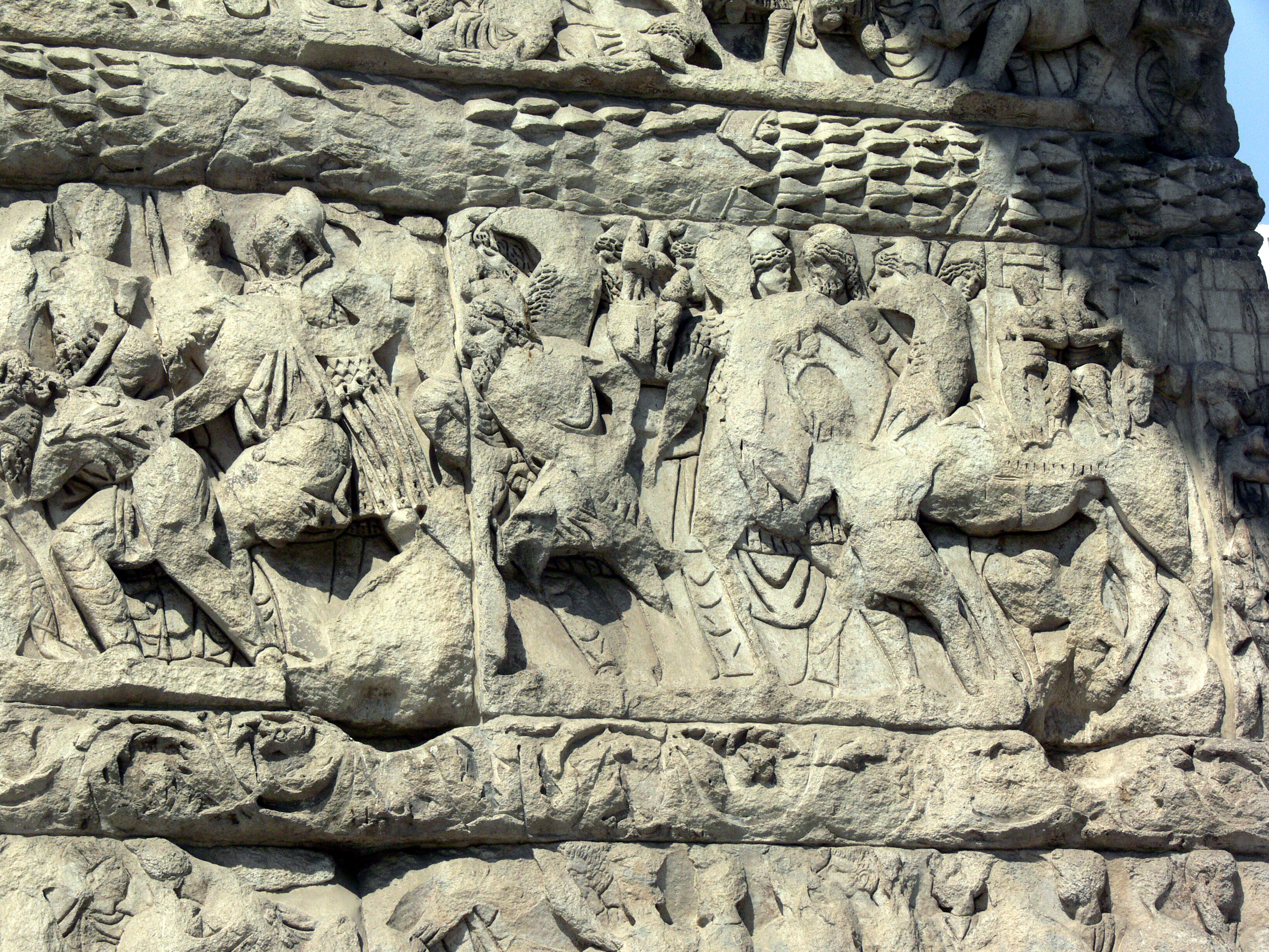 Tessaloniki. Galeriusbogen. Detail